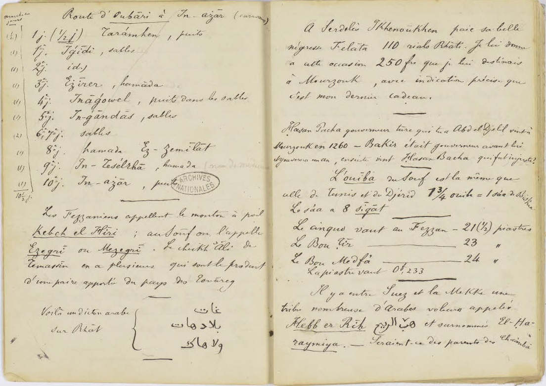 Henri Duveyrier. Carnet de voyage n°5 page 92-93